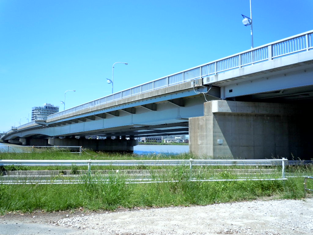 千歳大橋外観